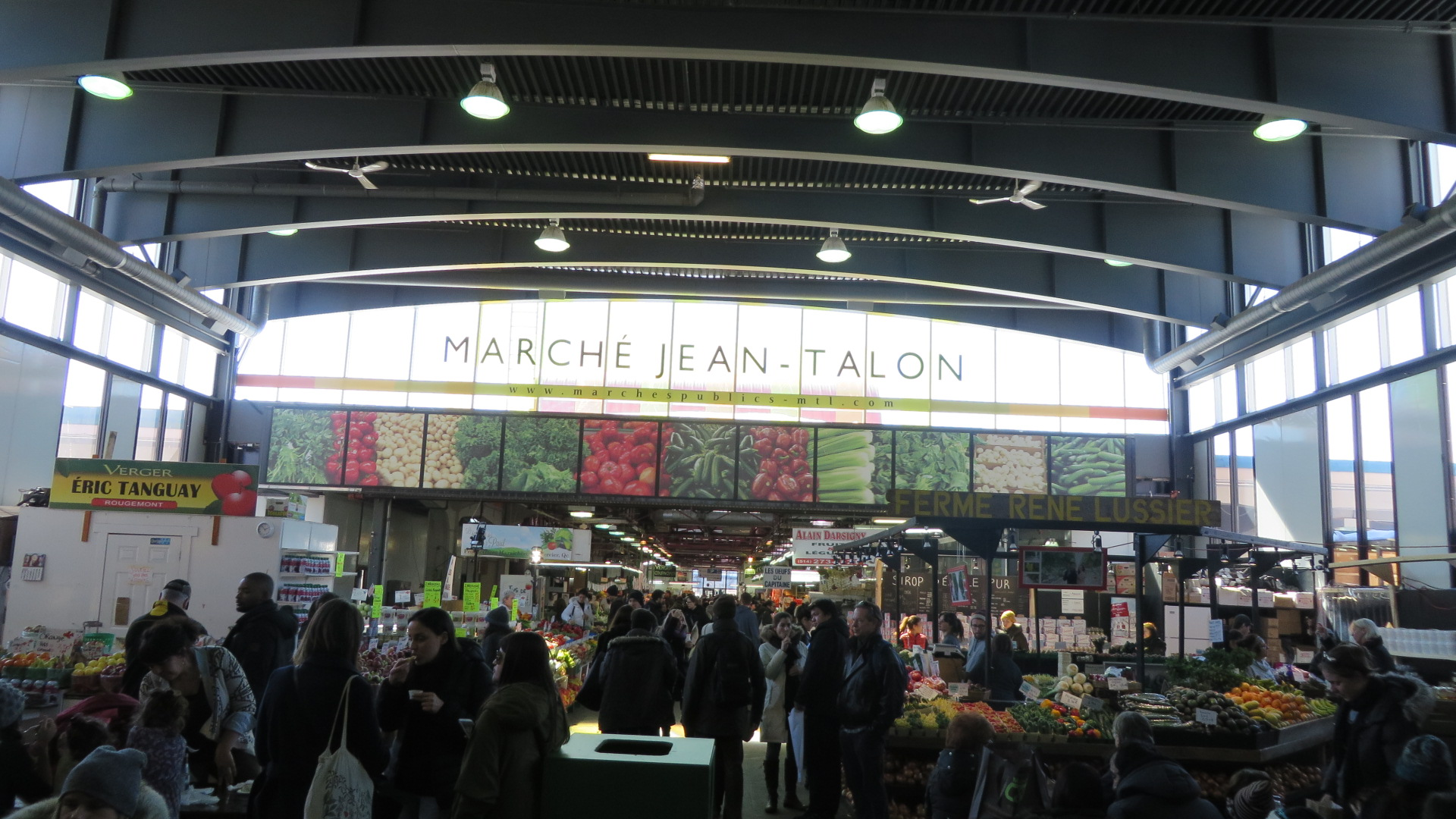 Marché Jean-Talon Villeray Montréal